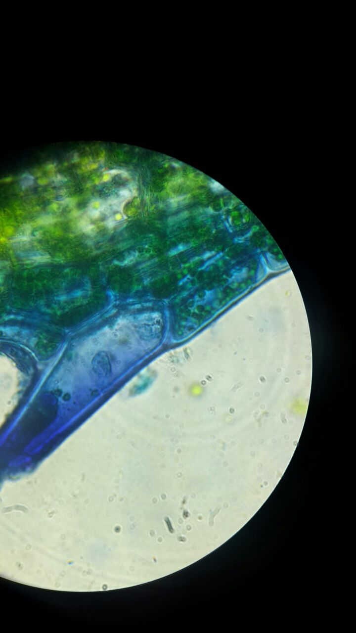 Preparato di elodea visto al microscopio a 1000x colorato al blu di metilene